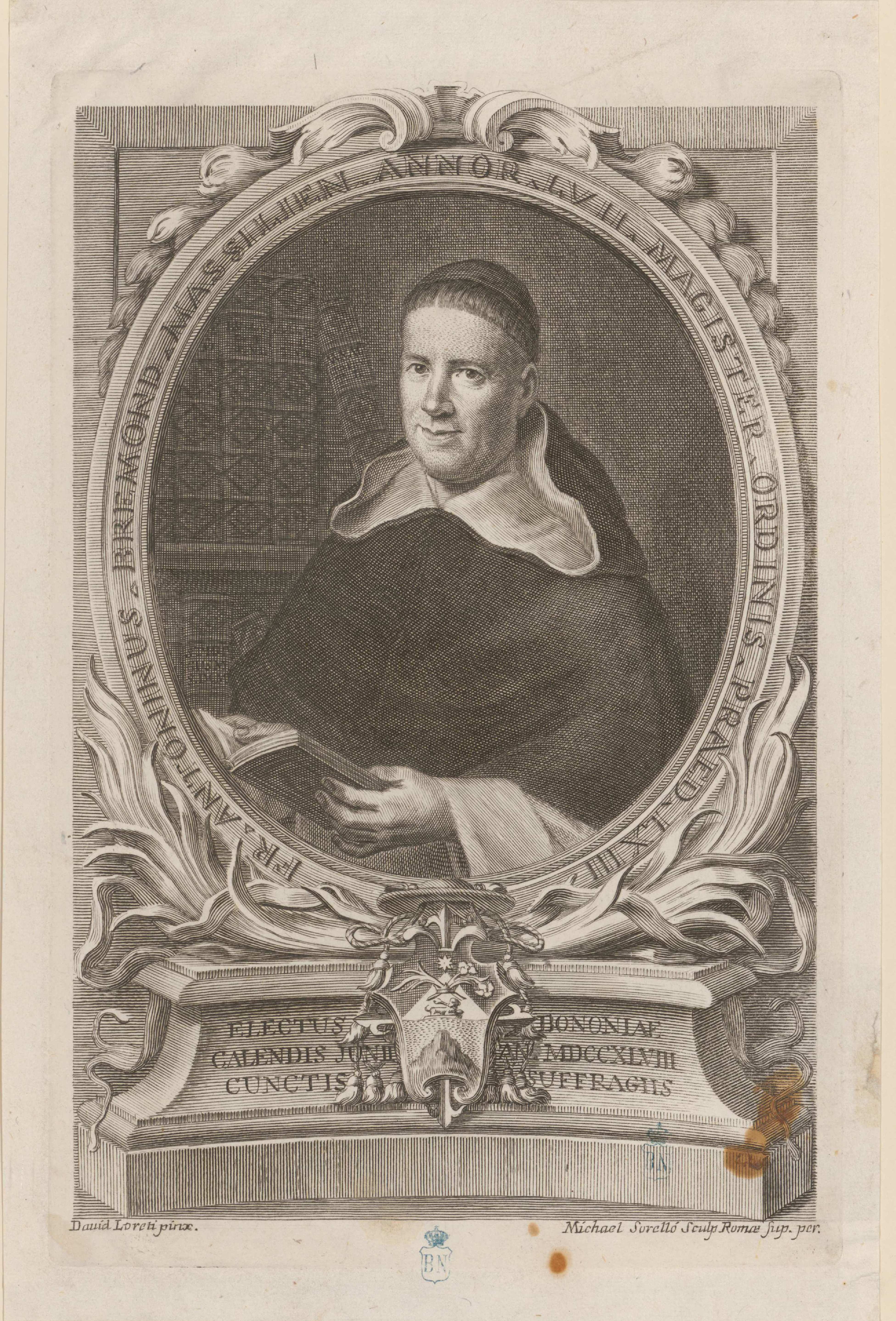 Retrato de Antonin Brémond. Aguafuerte de Miquel Sorelló por pintura de David Loreti. 1756. Firmado Dauid Loreti pinx. ; Michael Sorelló Sculp Romae Sup. per. Biblioteca Nacional de España